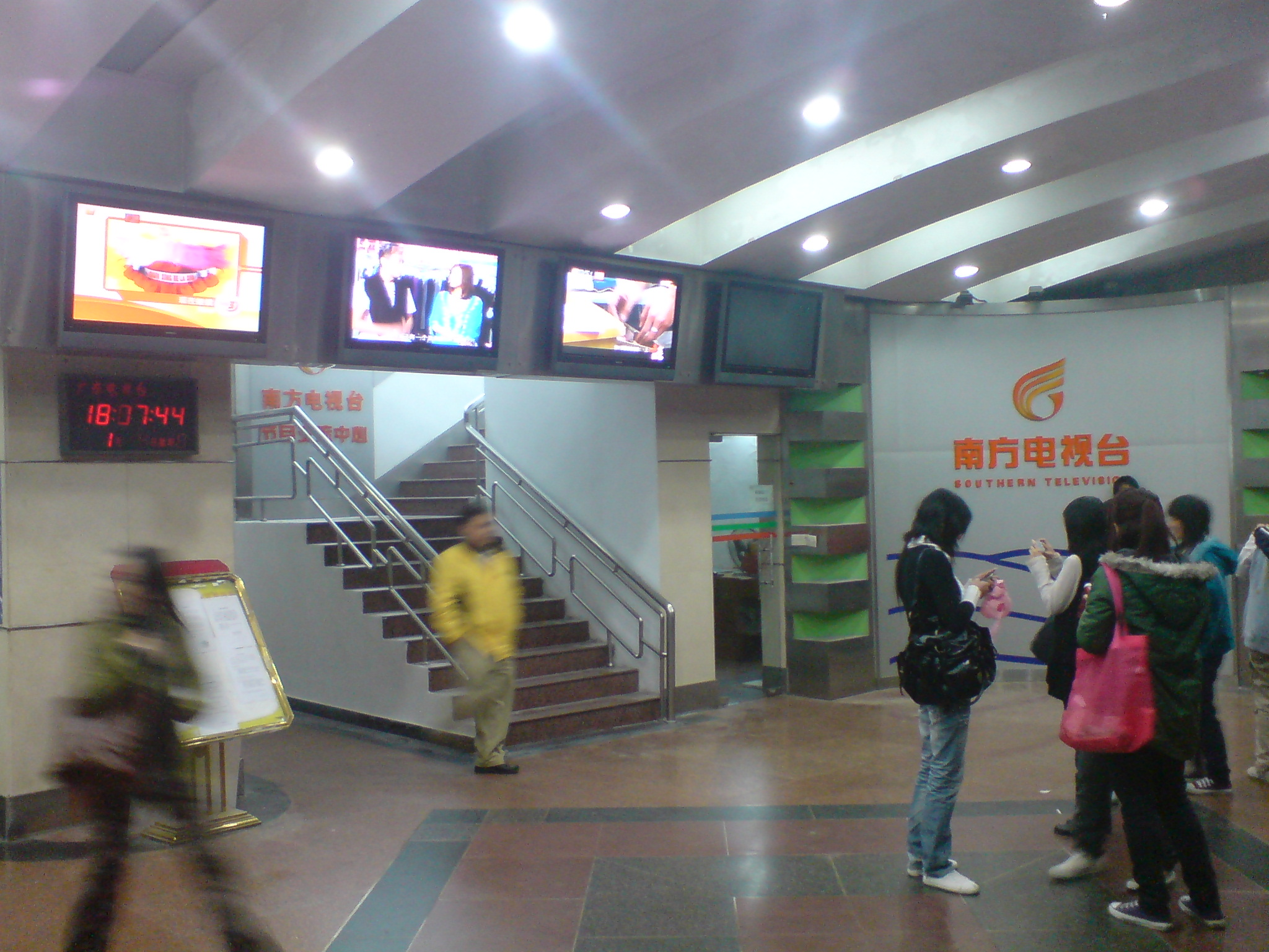 中文（中国大陆）: 南方电视台在广东电视台的演播厅